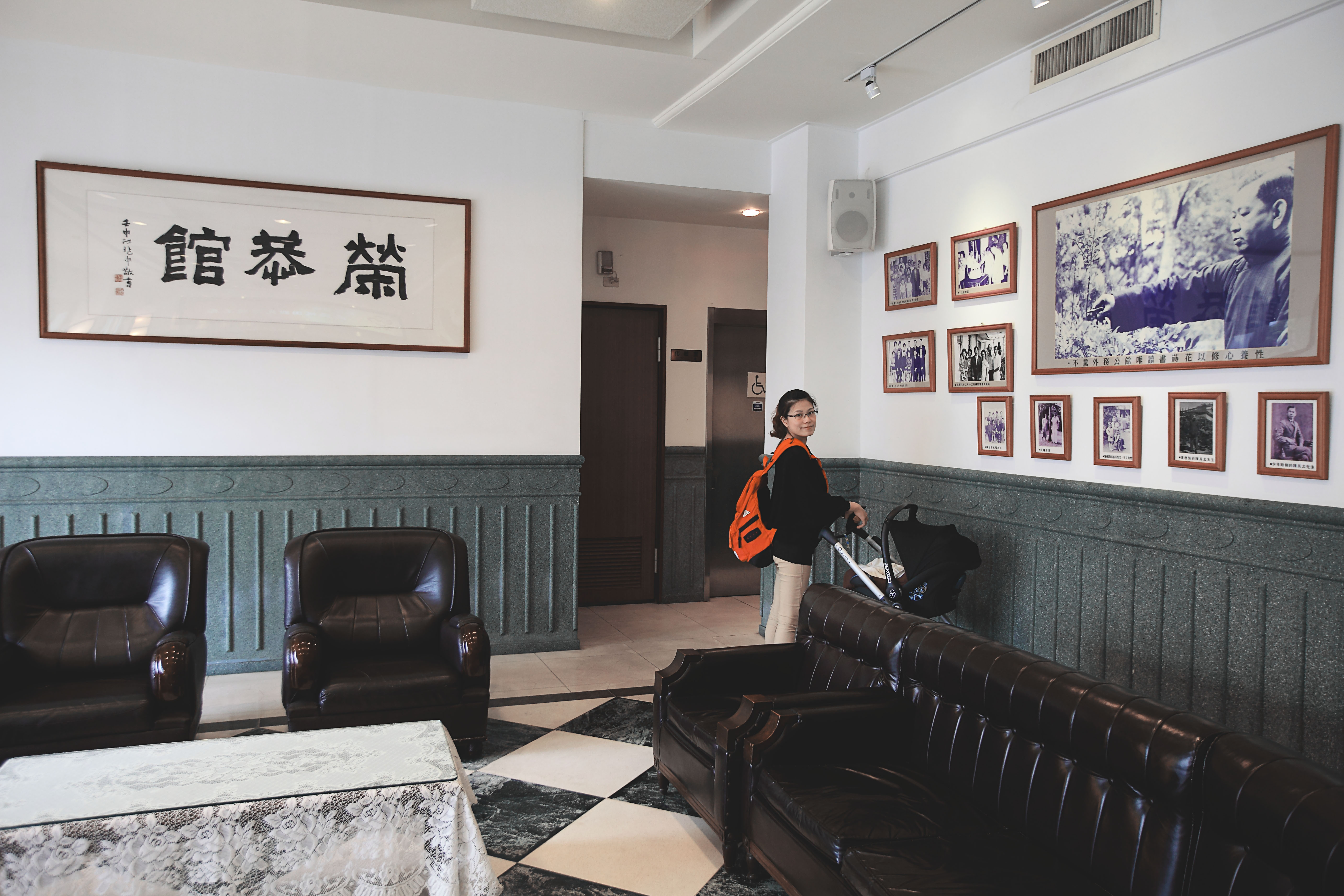 南僑桃園觀光體驗工廠榮恭館，紀念南僑化工創辦人陳其志。